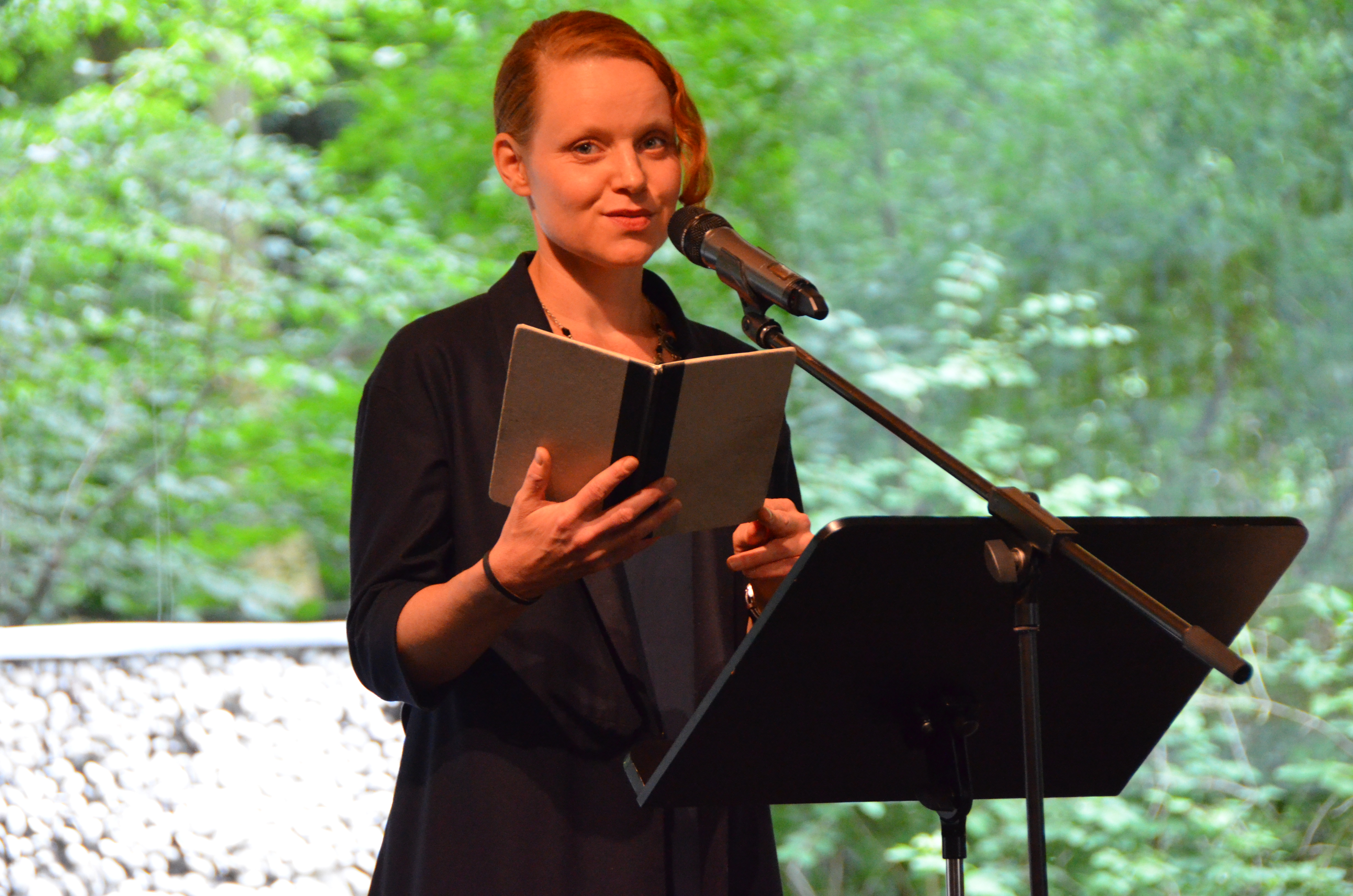 Cia Rinne liest auf dem Poesiefetival Berlin 2015